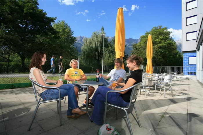 Terrasse des Studentenhauses